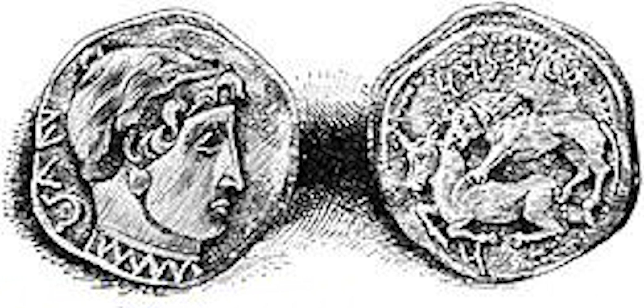 Moneda de Alejandro Magno